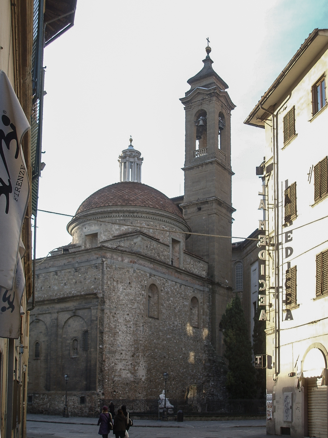 San lorenzo, sagrestia nuova esterno